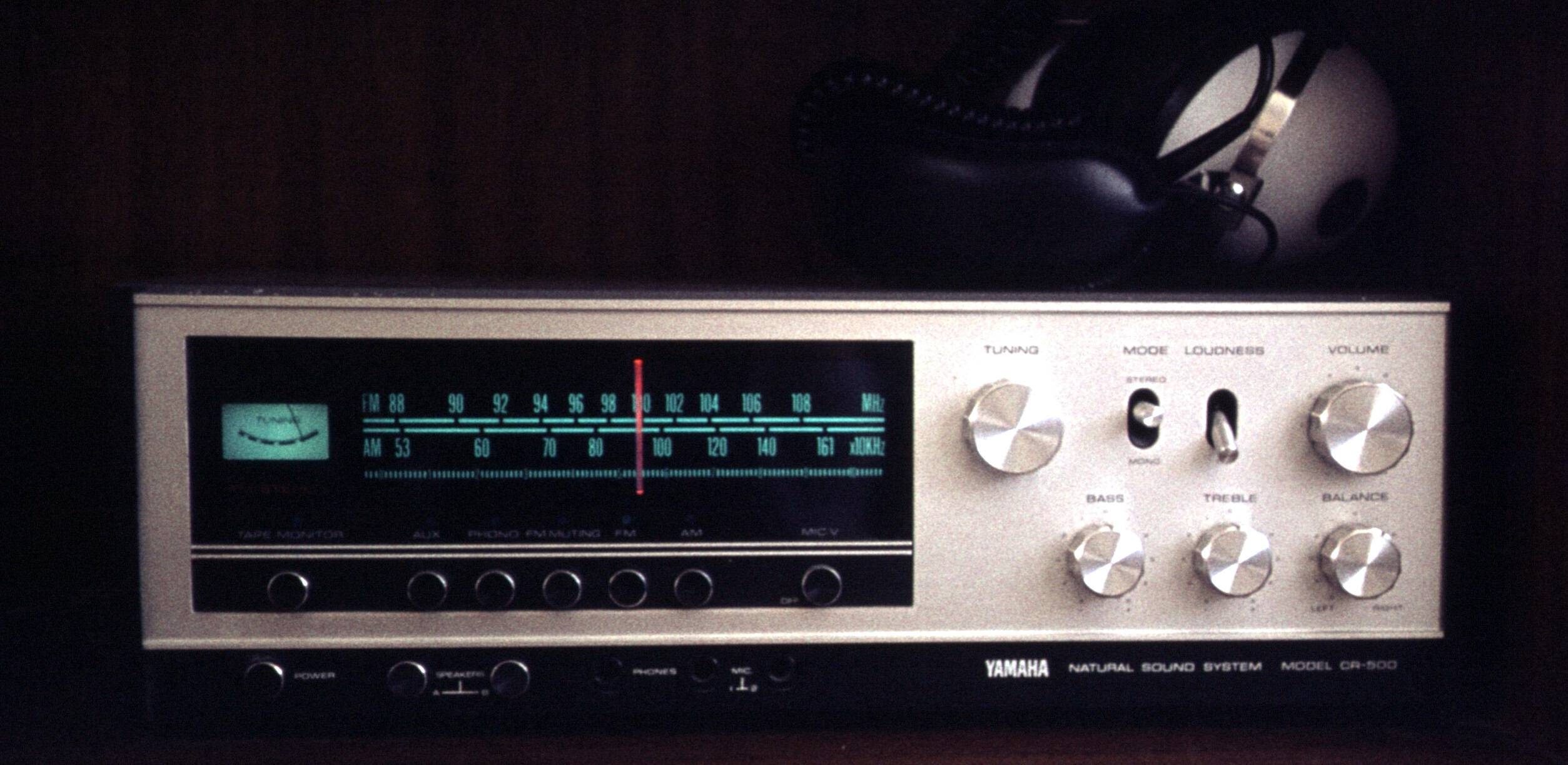 Hifi-Stereo-Anlage Yamaha CR-500, aufgenommen in den 1970ern